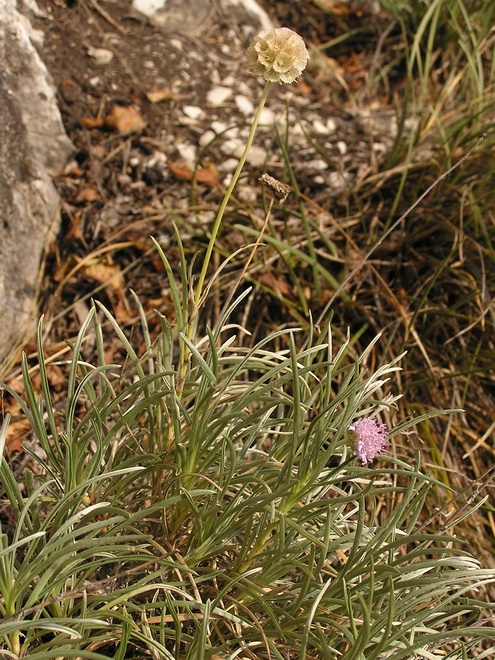 Aufnahme im September 2014 im Süden von Südtirol.